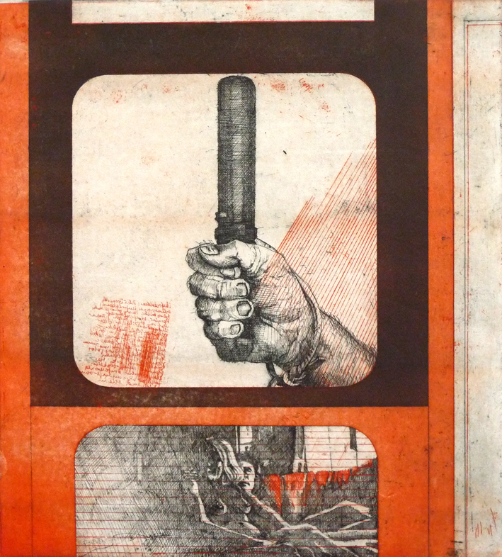 Peter Sorge, Heißer Sommer III, 1967, Farbradierung auf Kupferdruckbütten, Platte 44 x 39,5 cm, Blattmaß 63,7 x 54 cm, Auflage: 20, e.a., 2. Auflage 1970, Auflage: XV, 5 e.a., von Sorge nummeriert, signiert und datiert